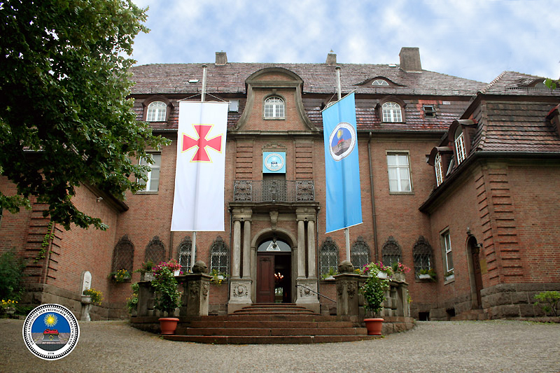 Замок Ордена в Берлине